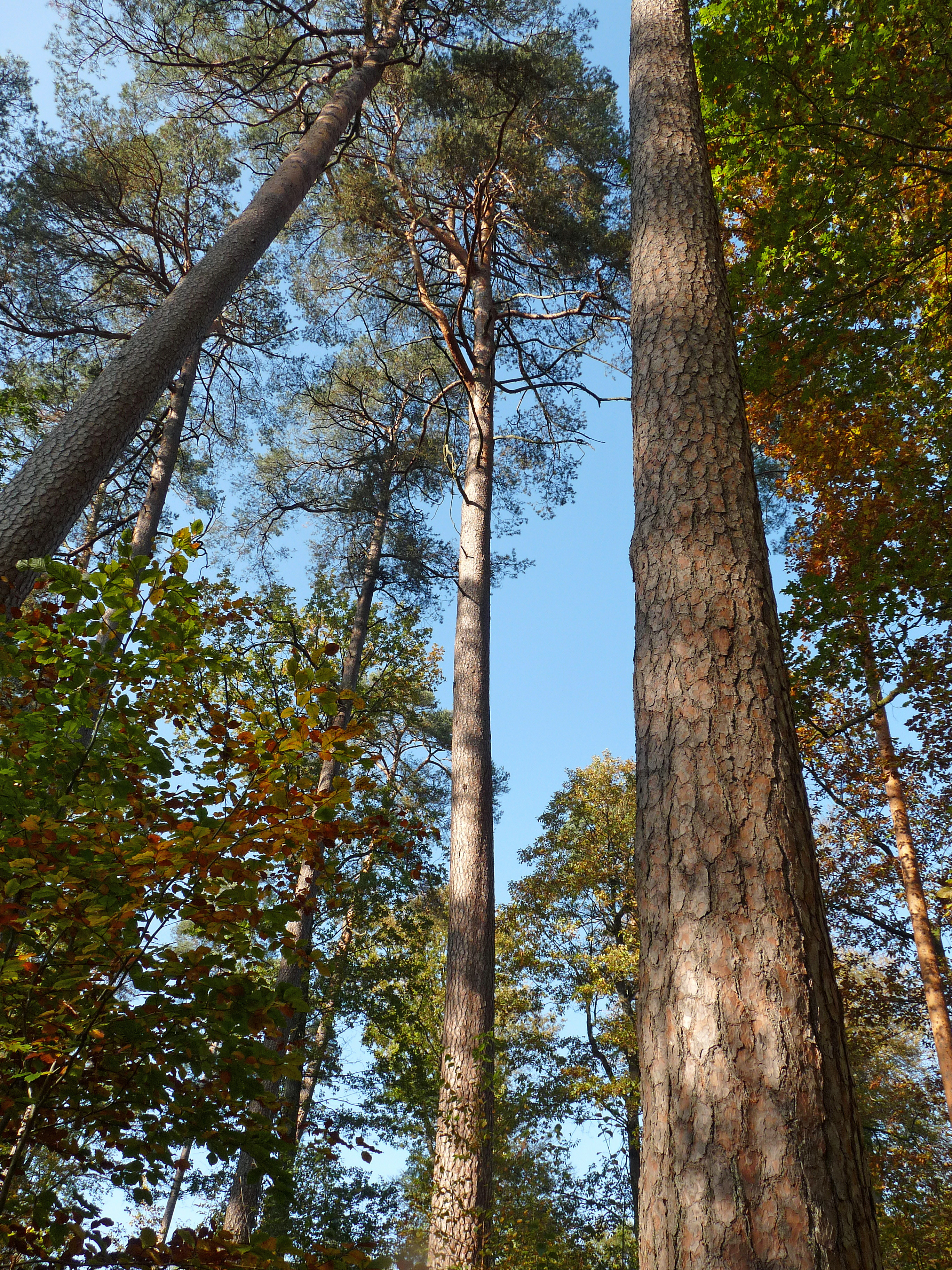 Étang de Hanau (Moselle) : Sentier de découverte de la tourbière, pins sylvestres de Hanau